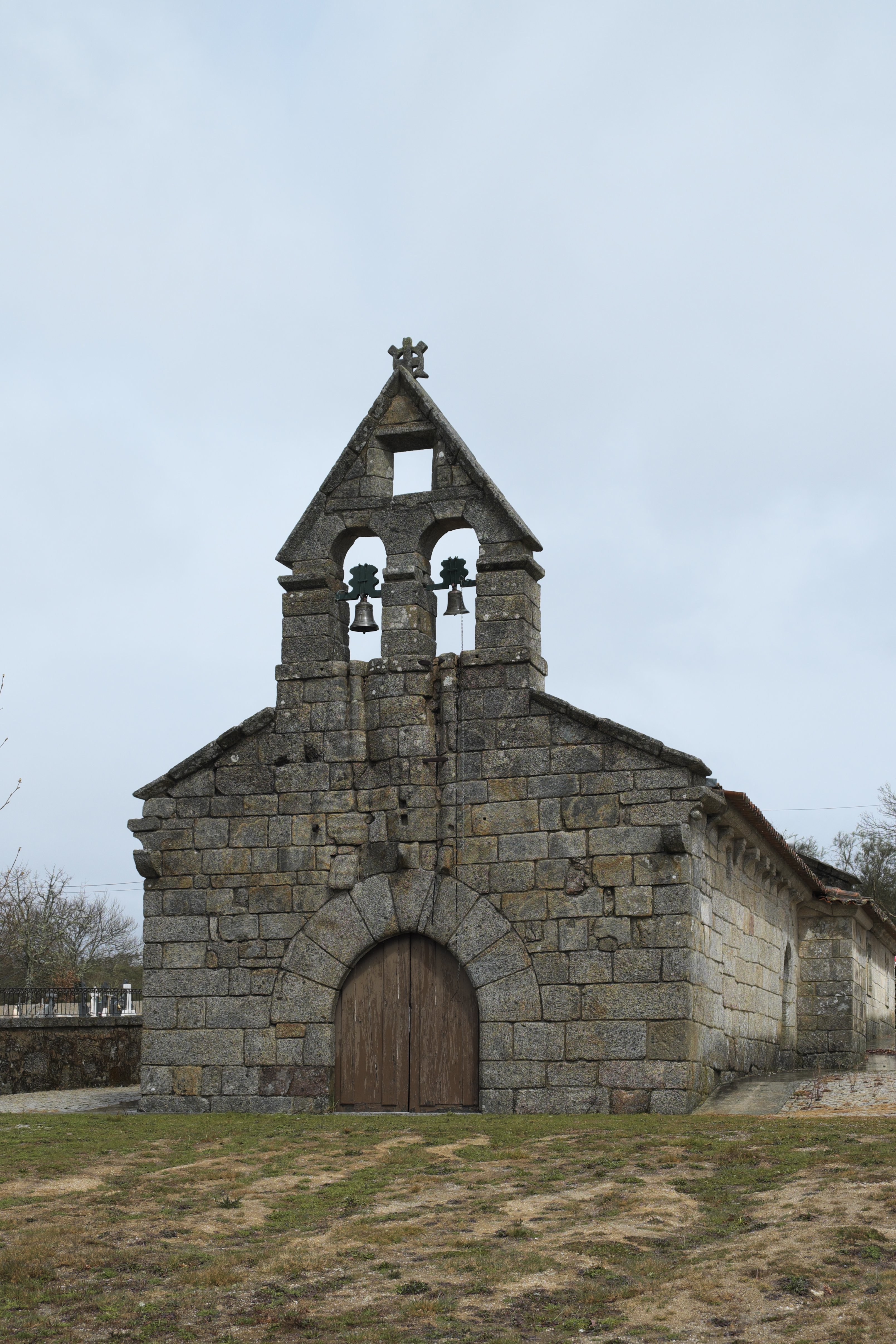 Romanische Pfarrkirche São Bartolomeu in Beça, einer Freguesia von Boticas in der Região Norte (Portugal)